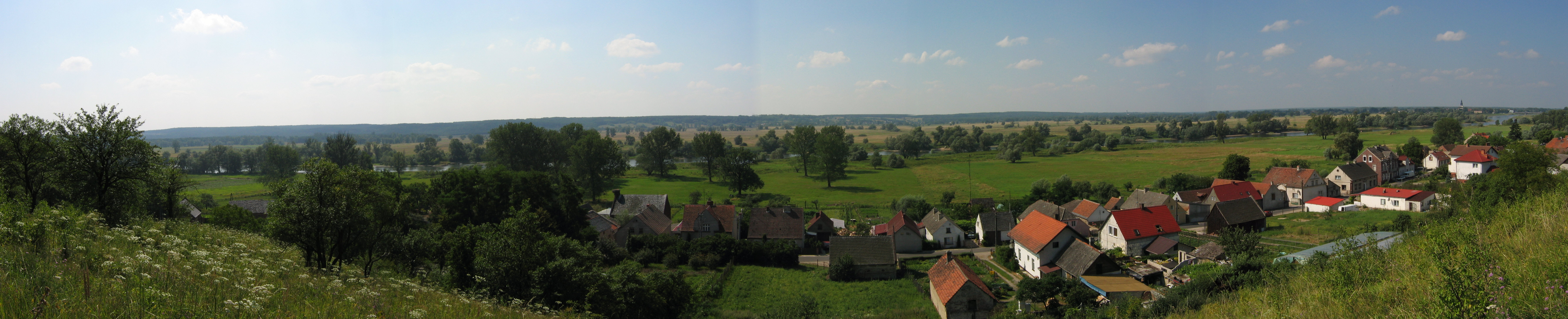 Wieś Chyże, w tle rzeka Odra